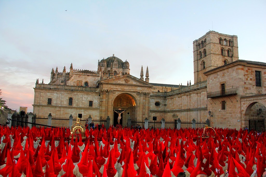 Real Hermandad del Santísimo Cristo de las Injurias desfilando la tarde de Miércoles Santo en la plaza de la Catedral.